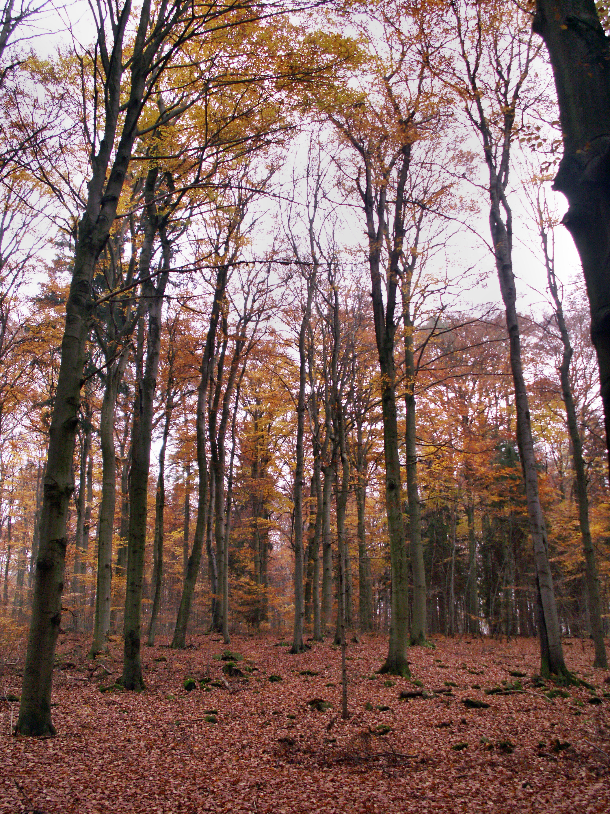 přírodní památka Rasuveň č. 1448, k.ú. Dolní Bory, okres Žďár nad Sázavou